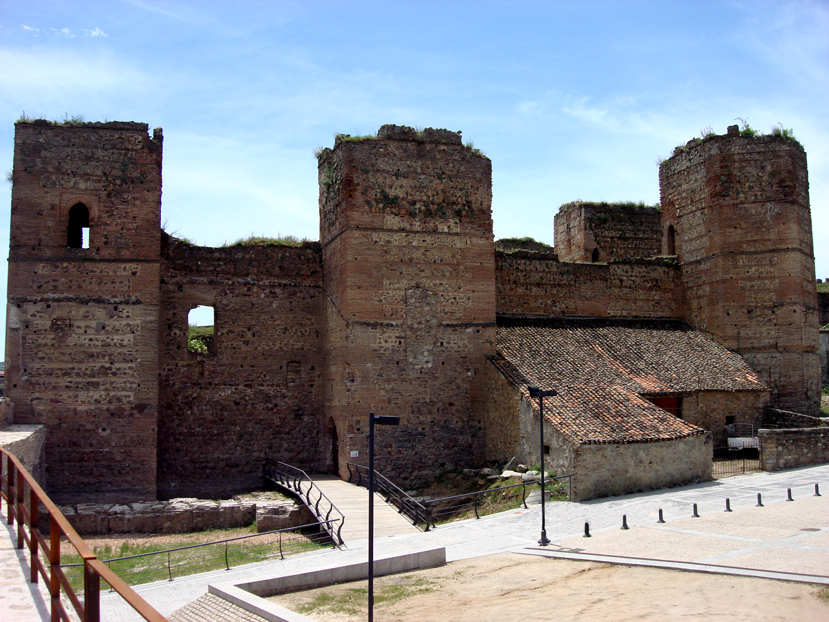 El castillo de Buitrago del Lozoya es un conjunto arquitectónico gótico-mudéjar del siglo XV con planta rectangular, siete torres y un patio de armas central. Este recinto está enmarcado dentro de la muralla, en su esquina sureste, y cuenta con un foso que lo protegía de las invasiones. Las torres son todas diferentes entre sí, habiendo sólo una de planta pentagonal. El acceso se realiza por una puerta en forma de recodo que se sitúa bajo una de las torres.